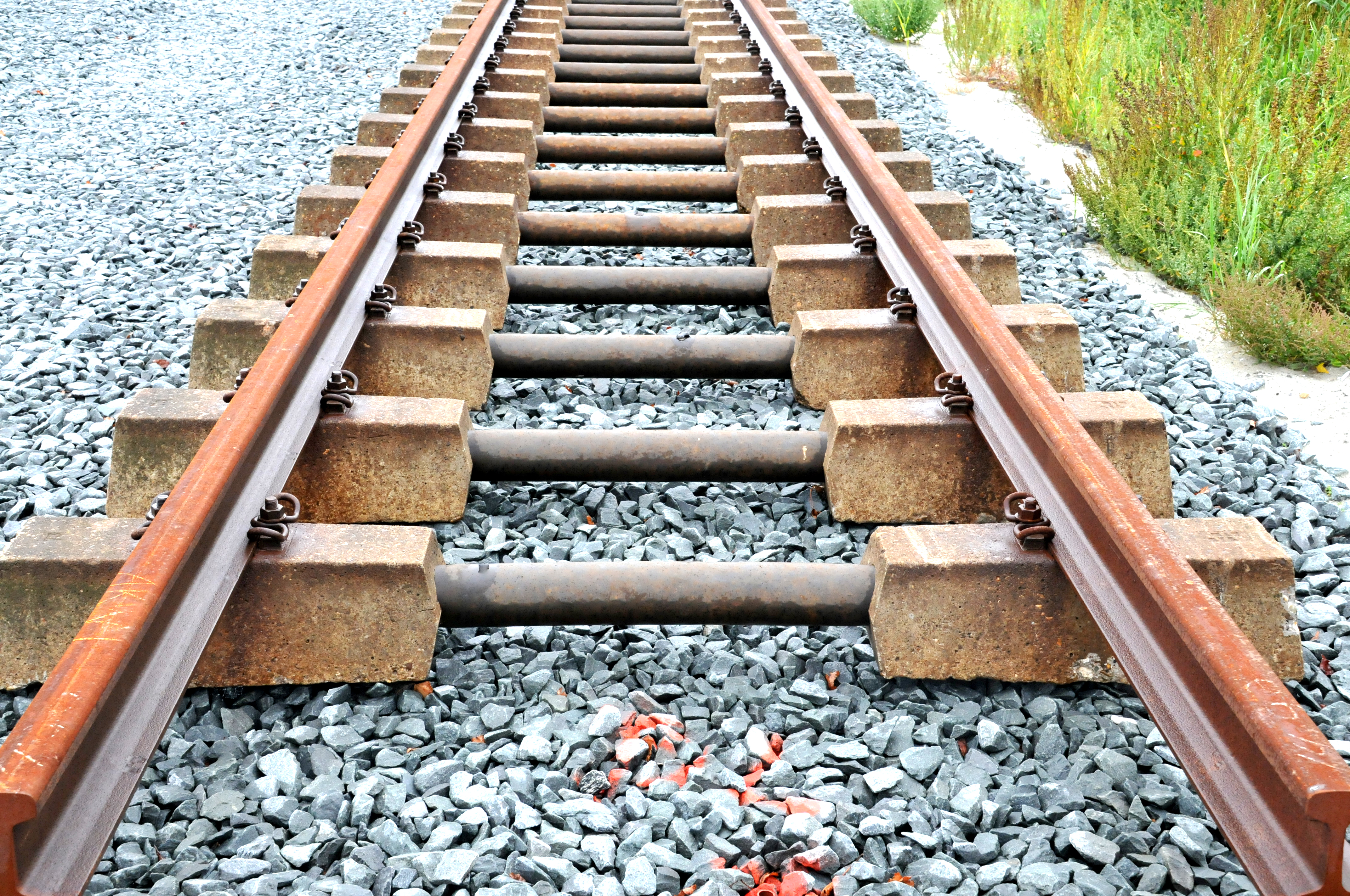 NS duoblockdwarsliggers bestaande uit duale blokken van beton verbonden met een stalen buis.